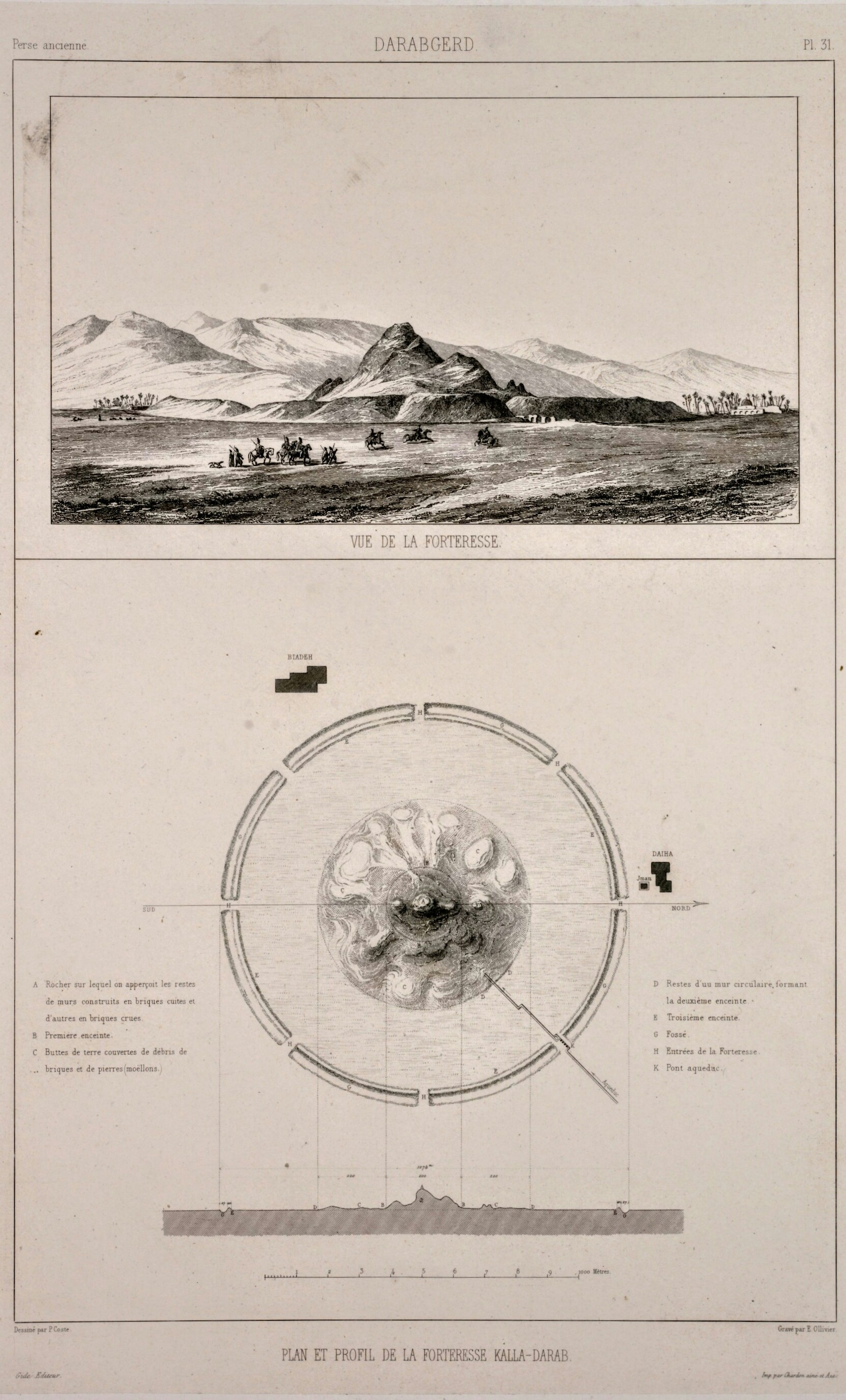 نگاره‌ای از شهردارابگرد و دژ دارابگرد (قلعه داراب) و موقعیت آن از کتاب «سفر در ایران» اثر پاسکال کوست میان سال‌های ۱۸۴۰ تا ۱۸۴۲